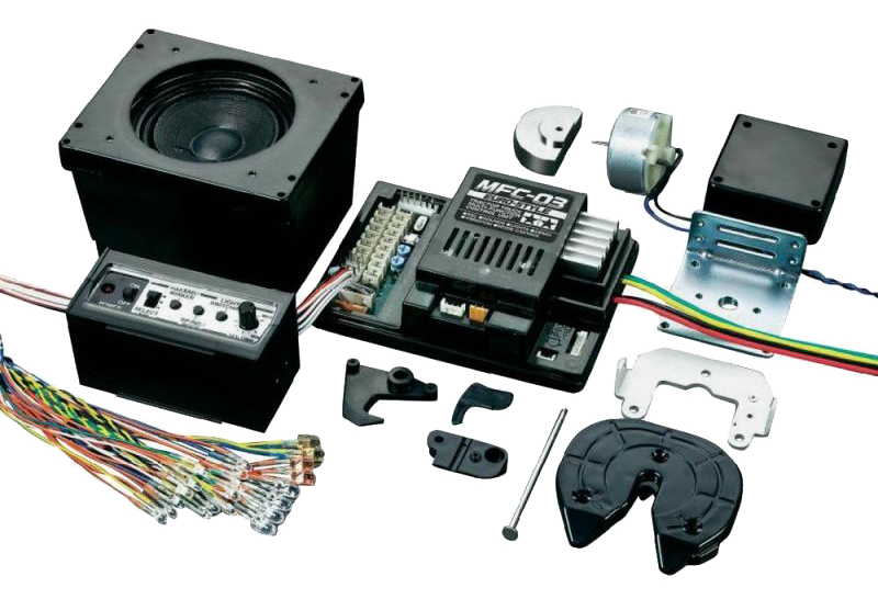 Exemple d'un Module de fonction Tamiya